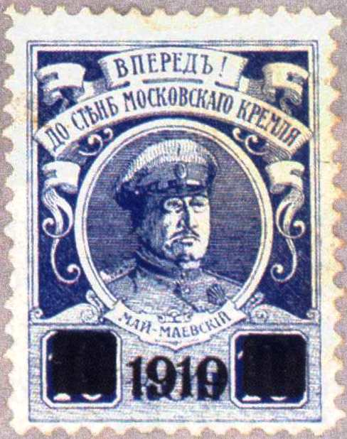 Пропагандистская марка от имени Вооружённых Сил Юга России (ВСЮР), с портретом командира Добровольческой армии Владимира Зеноновича Май-Маевского, героя «Адъютанта Его Превосходительства», штаб которого в конца июня по начало декабря 1919 года находился в Харькове. Марка из так называемой «генеральской» серии (7 марок). Агитационно-фантастический выпуск, типографская печать на мелованной бумаге. Марки отпечатаны предположительно в 1920 году за рубежом. Есть в «Каталоге-справочнике отечественных знаков почтовой оплаты» (приложение к журналу «Филателия», 1992, Т. 3).